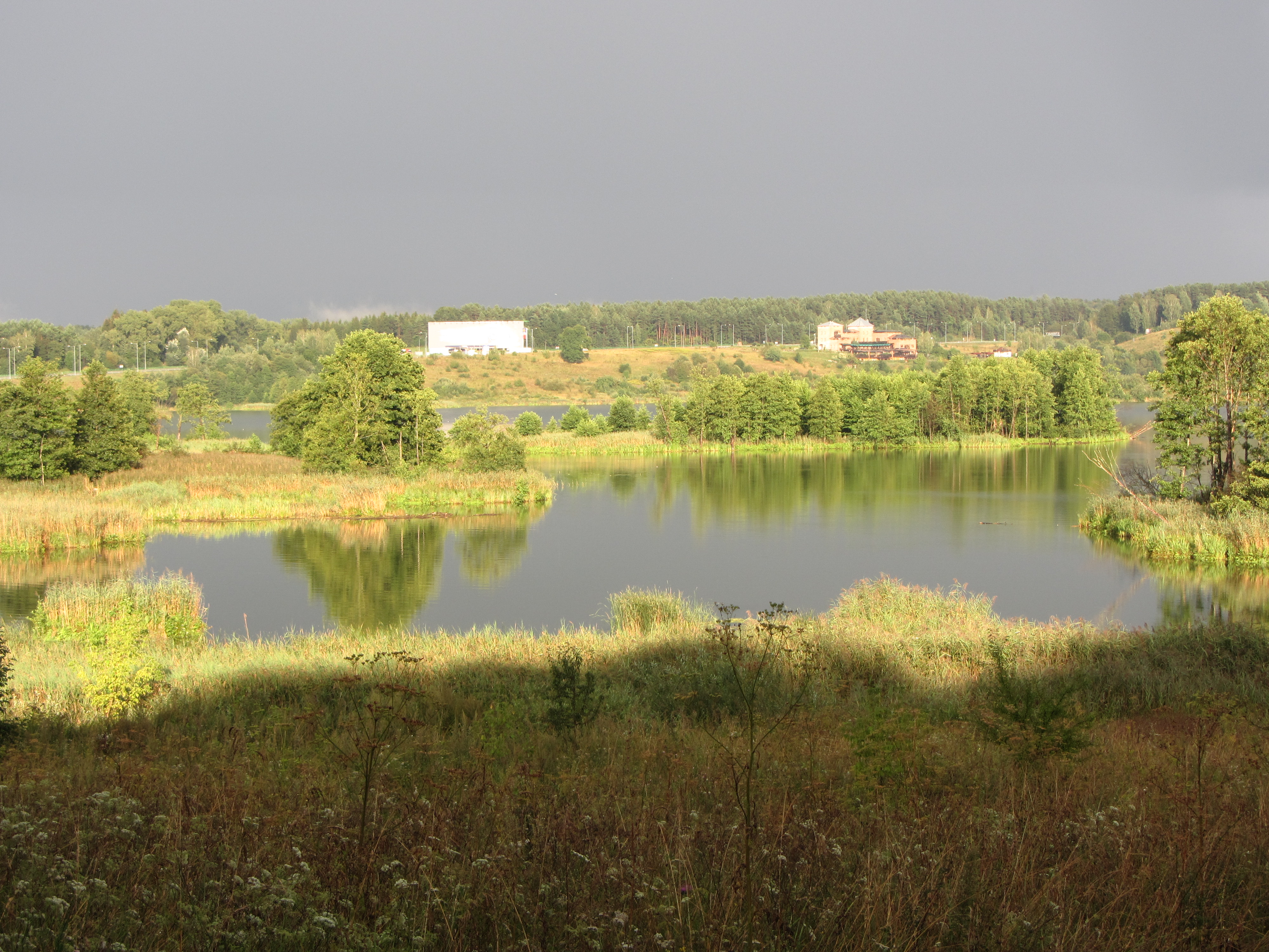 Lentvario sen., Lithuania